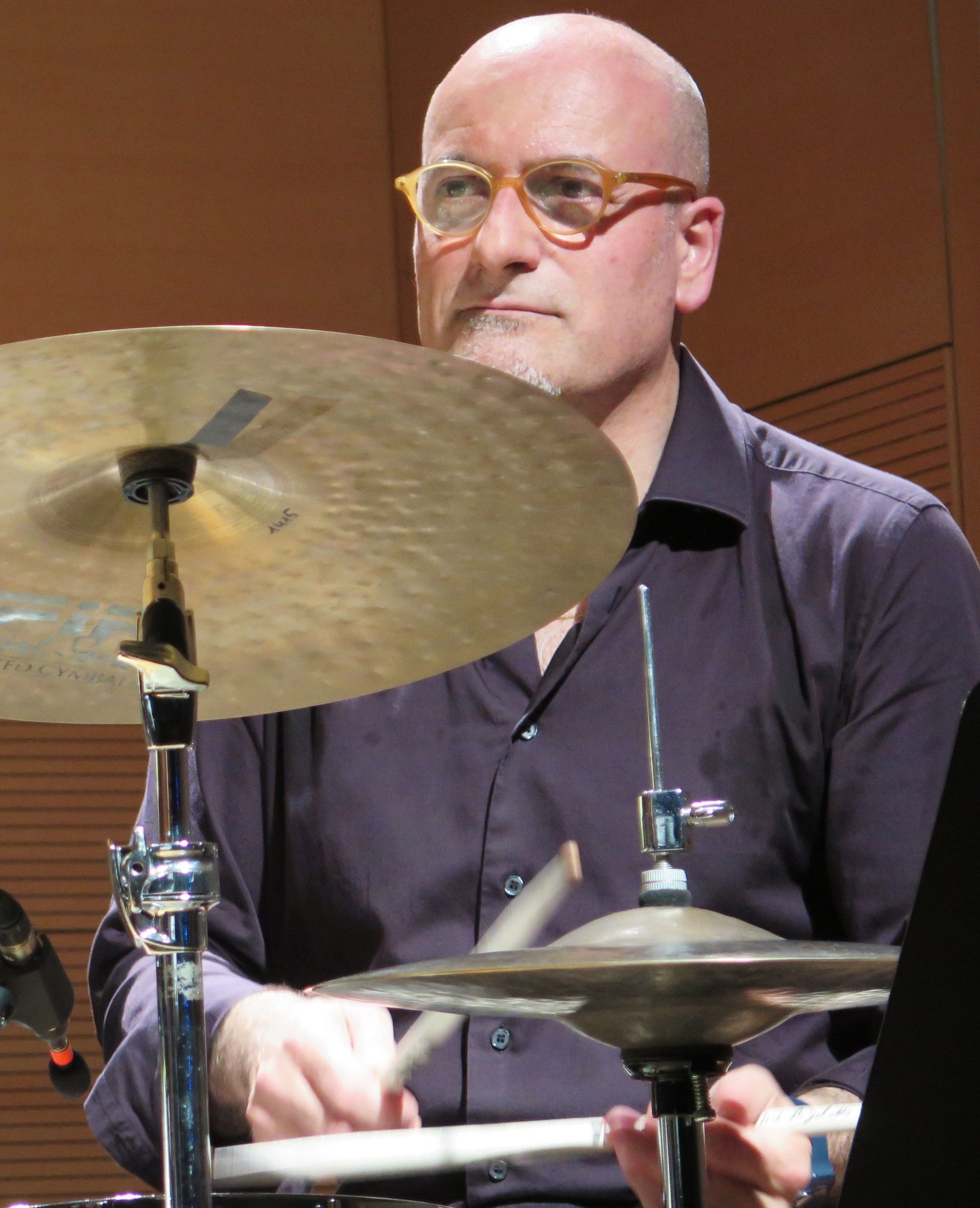 Ettore Fioravanti in concerto alla Casa del Jazz Roma